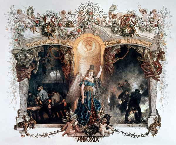 adresse zum fünfzigjährigen jubiläum der firma heckmann, gouache